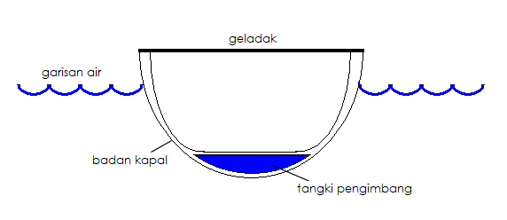 Kedudukan tangki pengimbang.